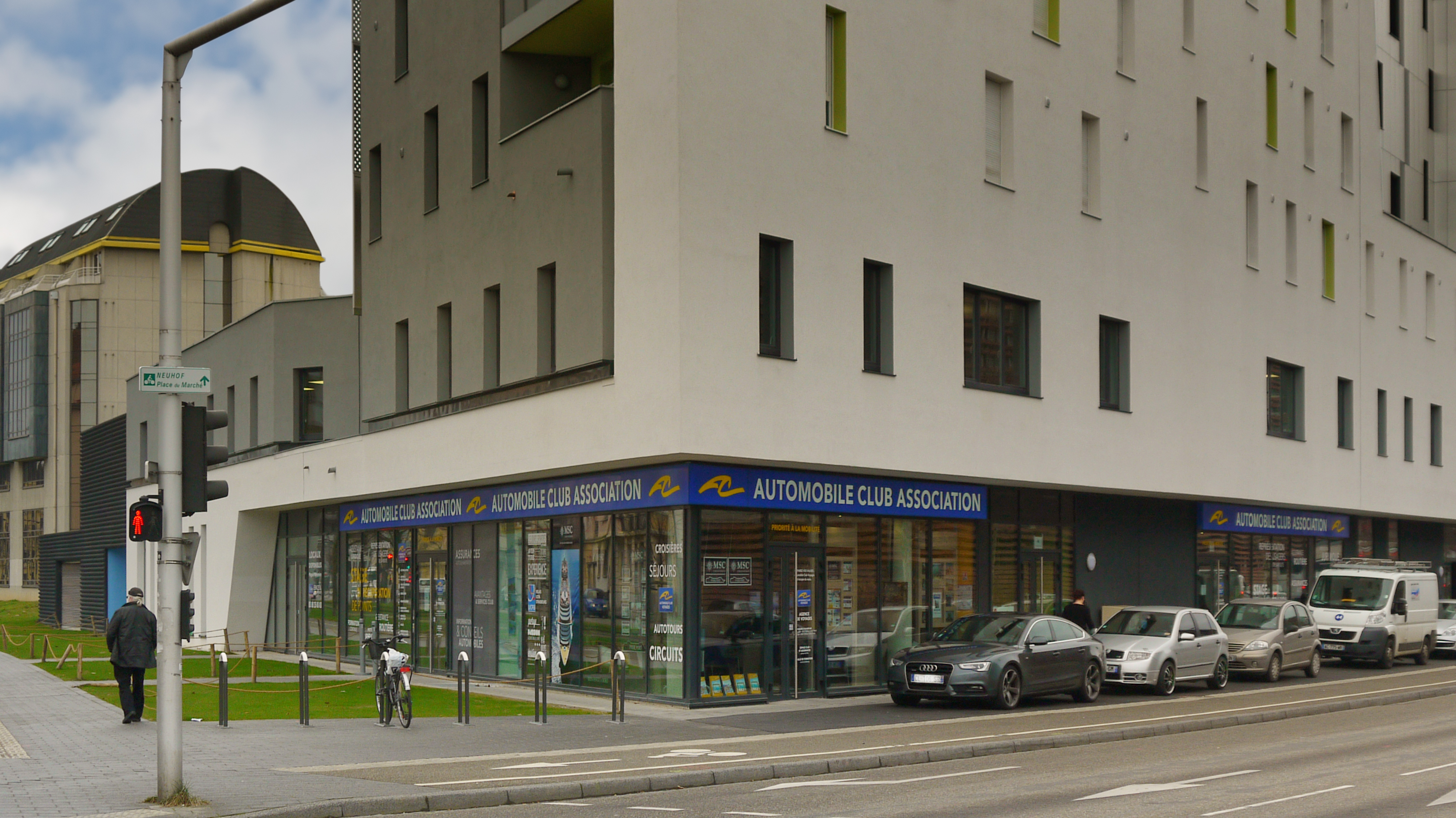 Façade principale de l'Automobile Club Association, 38 avenue du Rhin à strasbourg